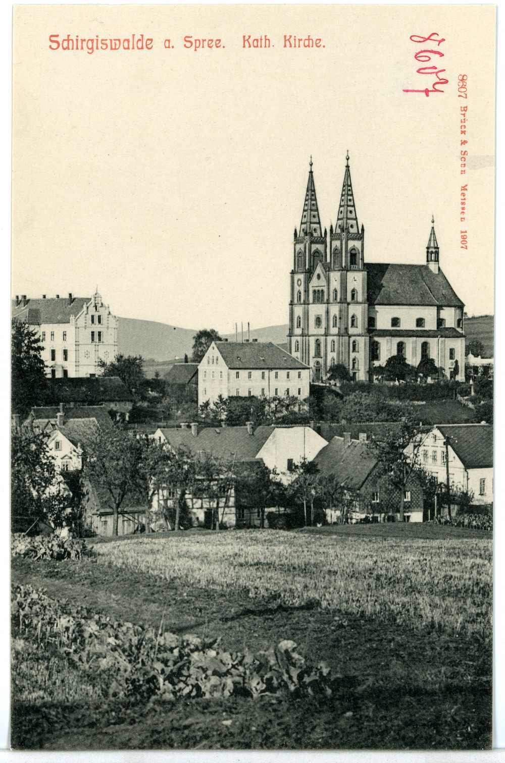 Schirgiswalde; Katholische Kirche This postcard is from publisher Brück & Sohn in Meißen ( This postcard has a unique number 08607 and is available in a higher resolution at the publisher. This images was uploaded in a cooperation project between Wikipedians and the publisher.